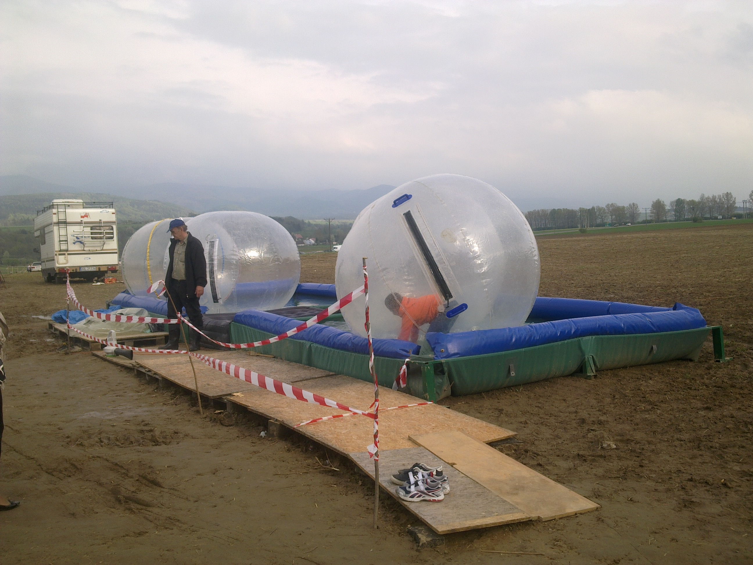 Bystrzyca Klodzka - Jarmark Florianski - Aquazorbing